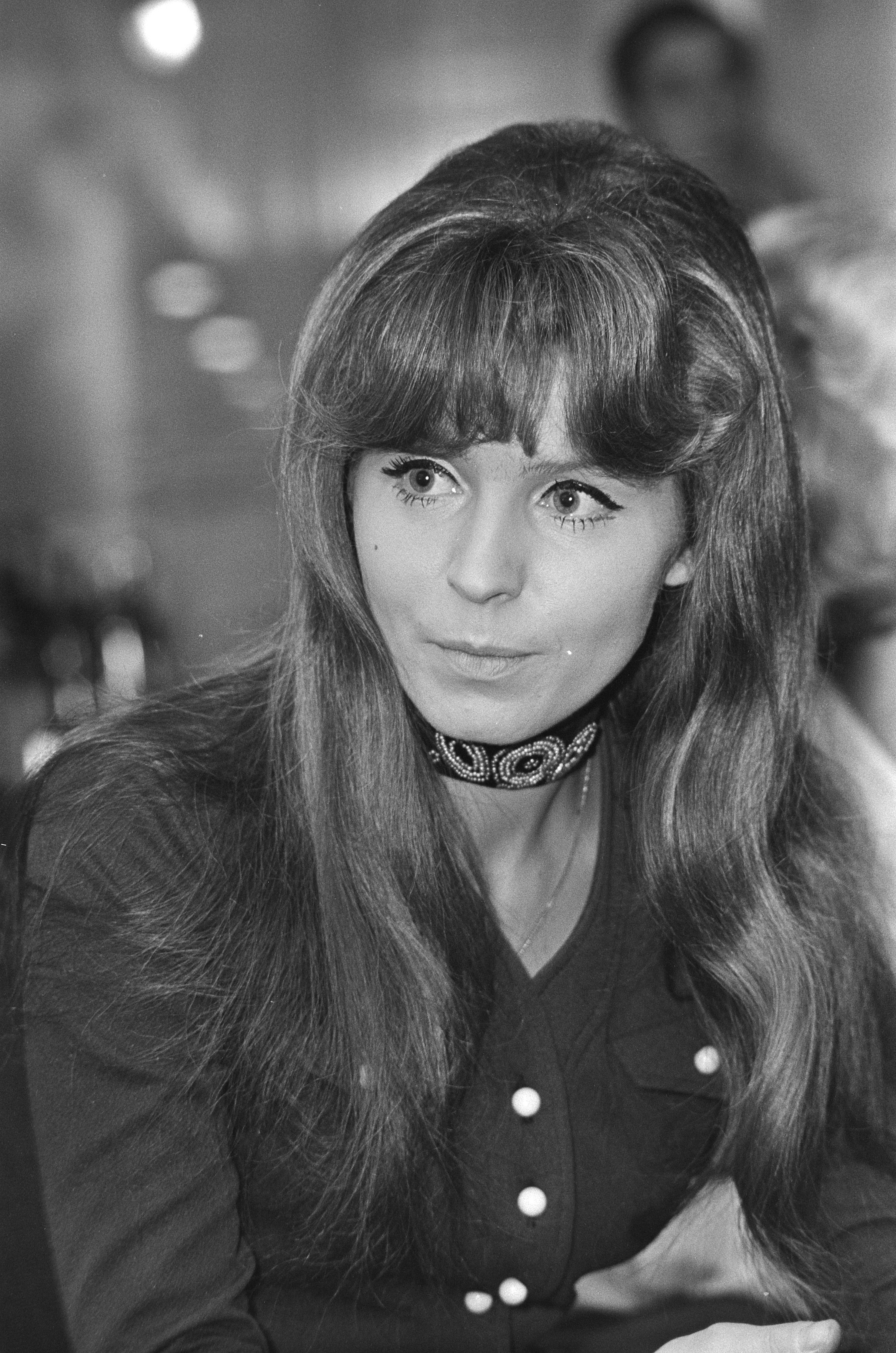 Collectie / Archief : Fotocollectie Anefo Reportage / Serie : [ onbekend ] Beschrijving : Schlagerzangeres "Manuela" (Duitsland) in Esso Motor Hotel , Amsterdam; Manuela, kop Datum : 15 januari 1971 Locatie : Amsterdam, Noord-Holland Trefwoorden : zangeressen Persoonsnaam : Esso Motor Hotel Fotograaf : Mieremet, Rob / Anefo Auteursrechthebbende : Nationaal Archief Materiaalsoort : Negatief (zwart/wit) Nummer archiefinventaris : bekijk toegang 2.24.01.05 Bestanddeelnummer : 924-1786